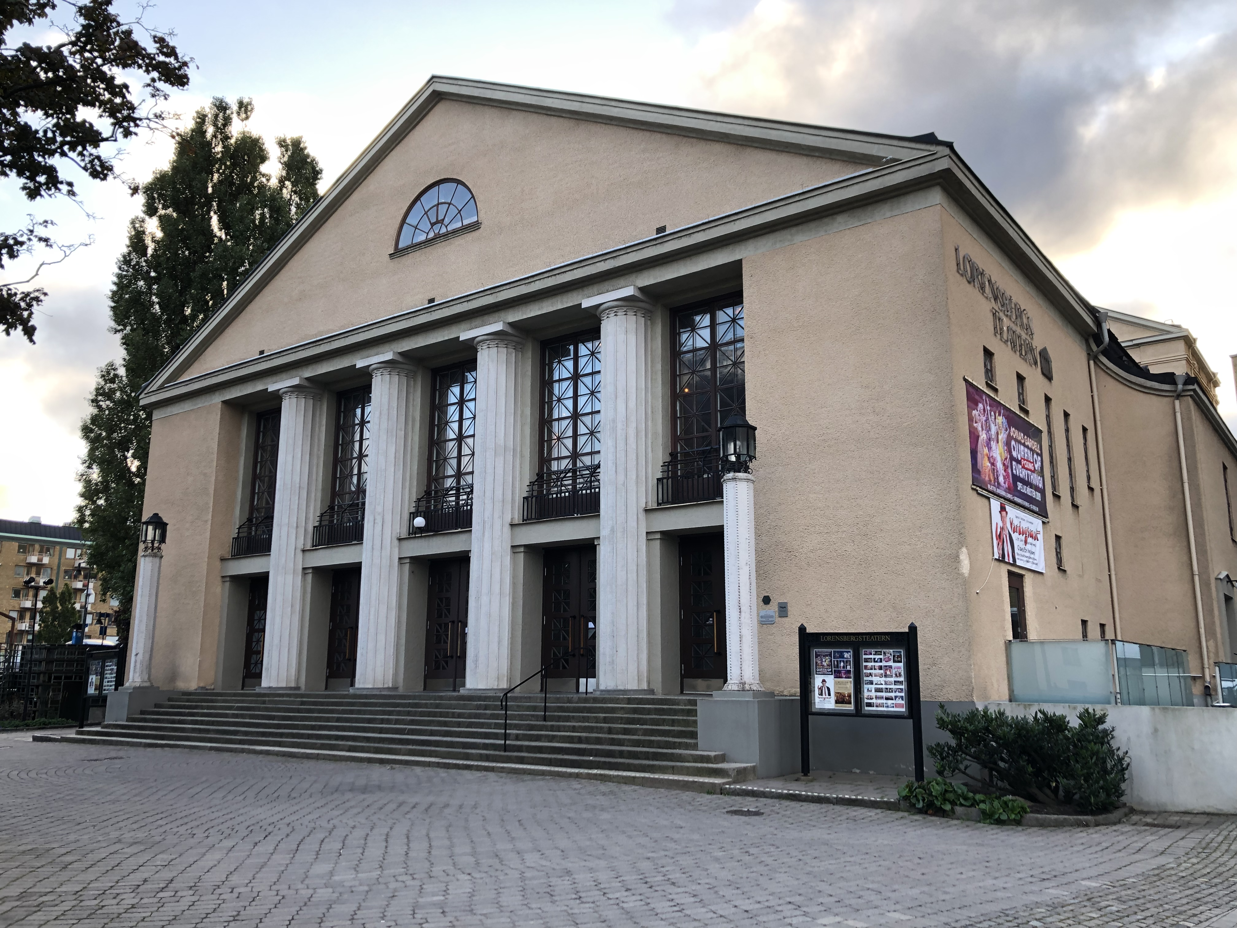 Lorensbergsteaterns huvudfasad